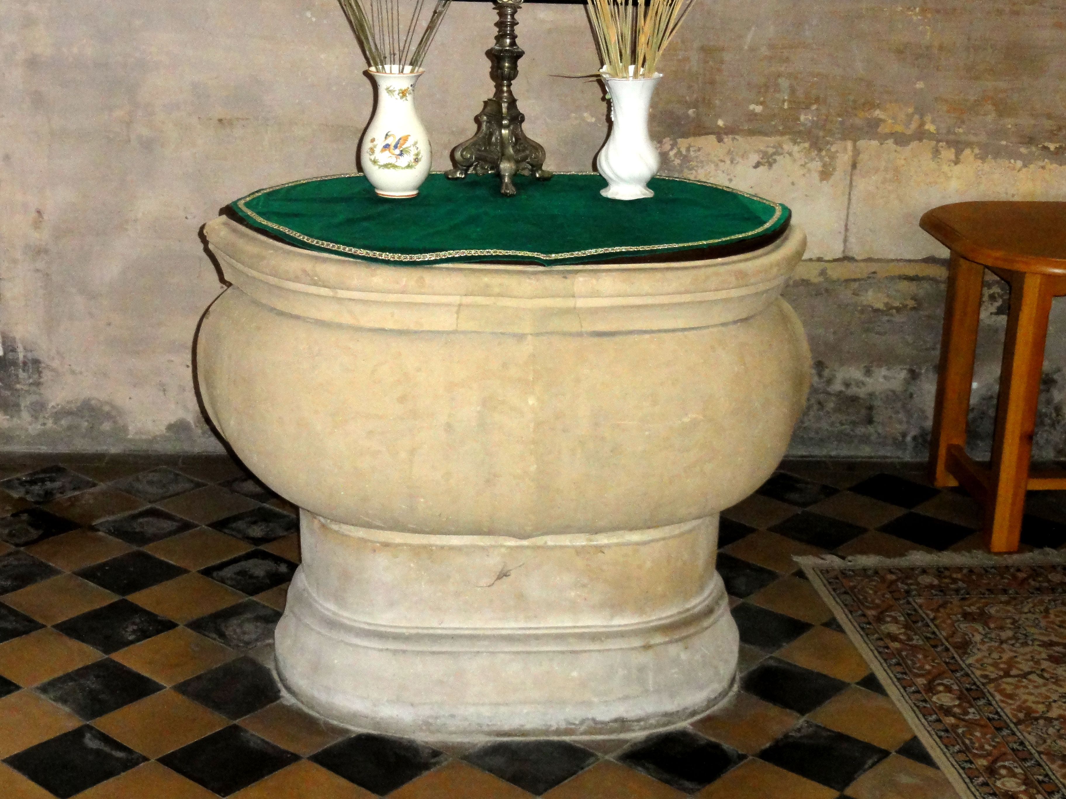 Bas-côté nord, 1ère travée, fonts baptismaux.